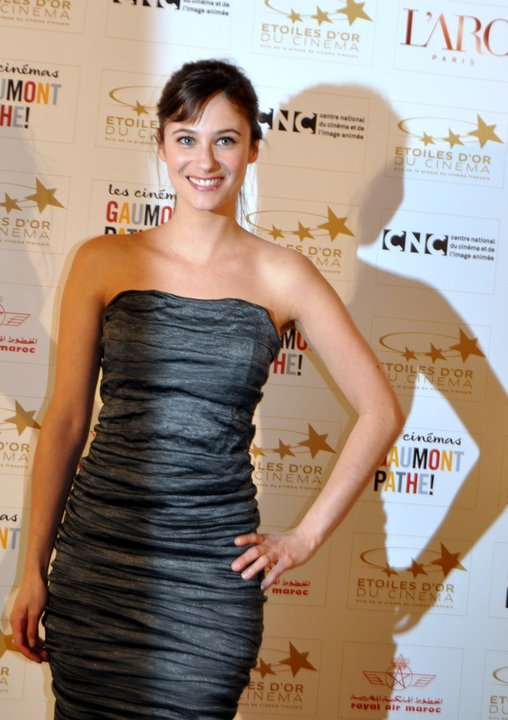 Mélanie Bernier à la cérémonie des étoiles d'or du cinéma français